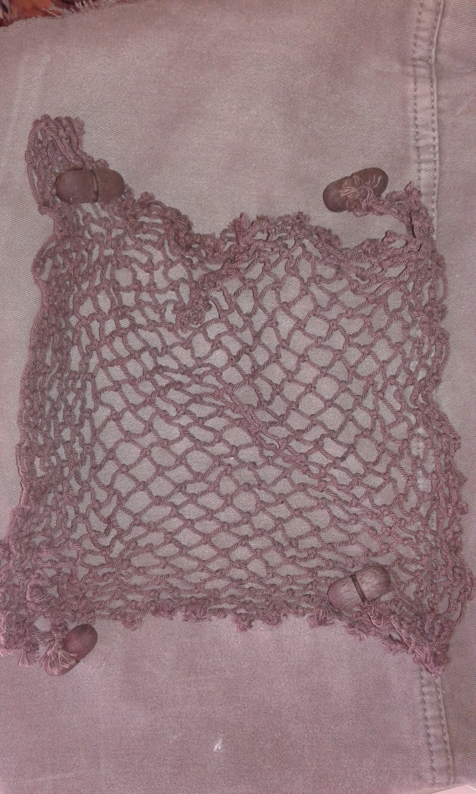 Esempio di retino postbellico per l'elmetto M33 con i quattro fermi in legno scuri.